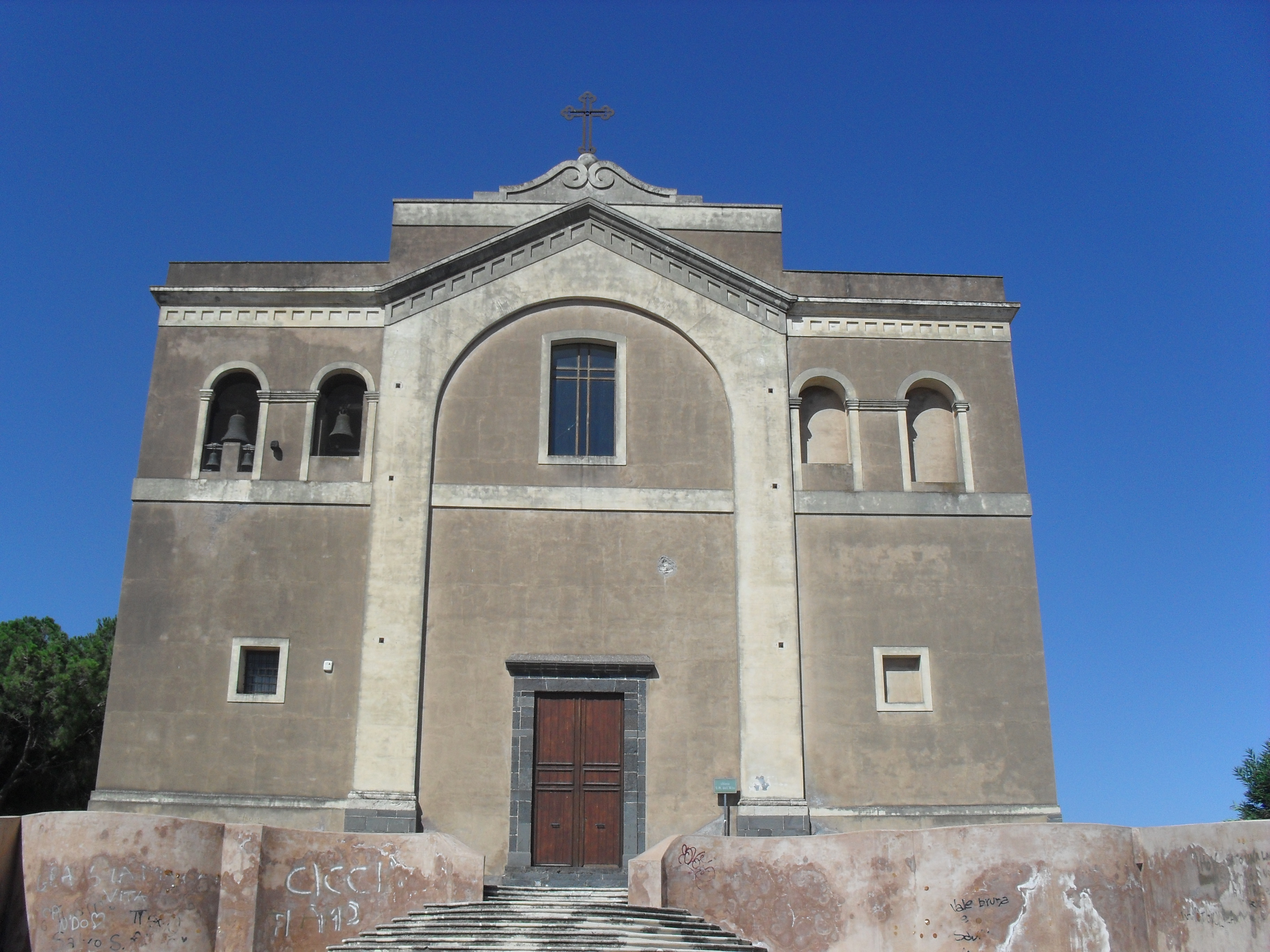 Facciata della Chiesa di Santa Maria dell'Alto a Paternò (CT)